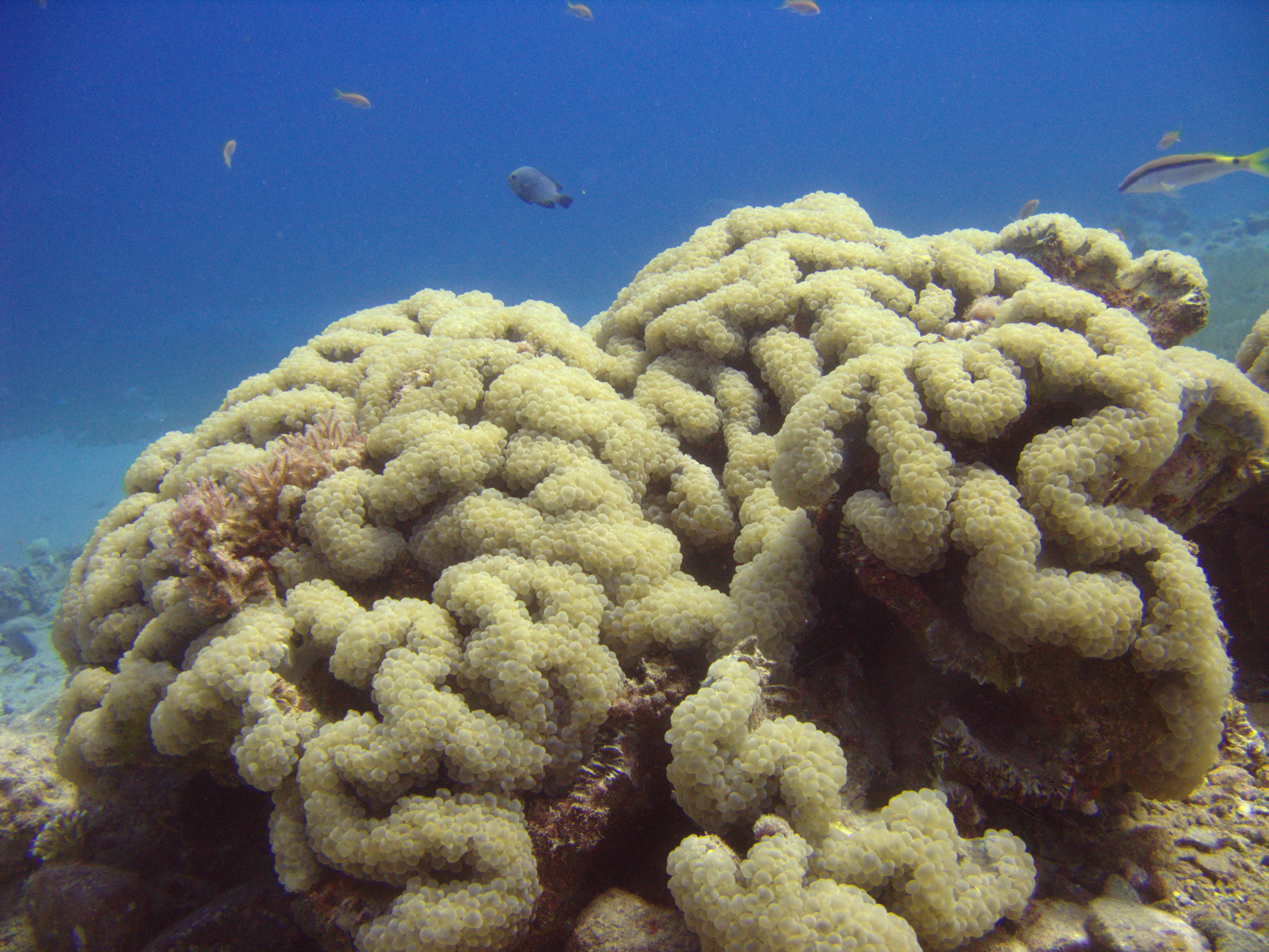 Physogyra lichtensteini (probablemente, o Plerogyra sinuosa), en Dhahab Janub Sina', Egipto, 2013